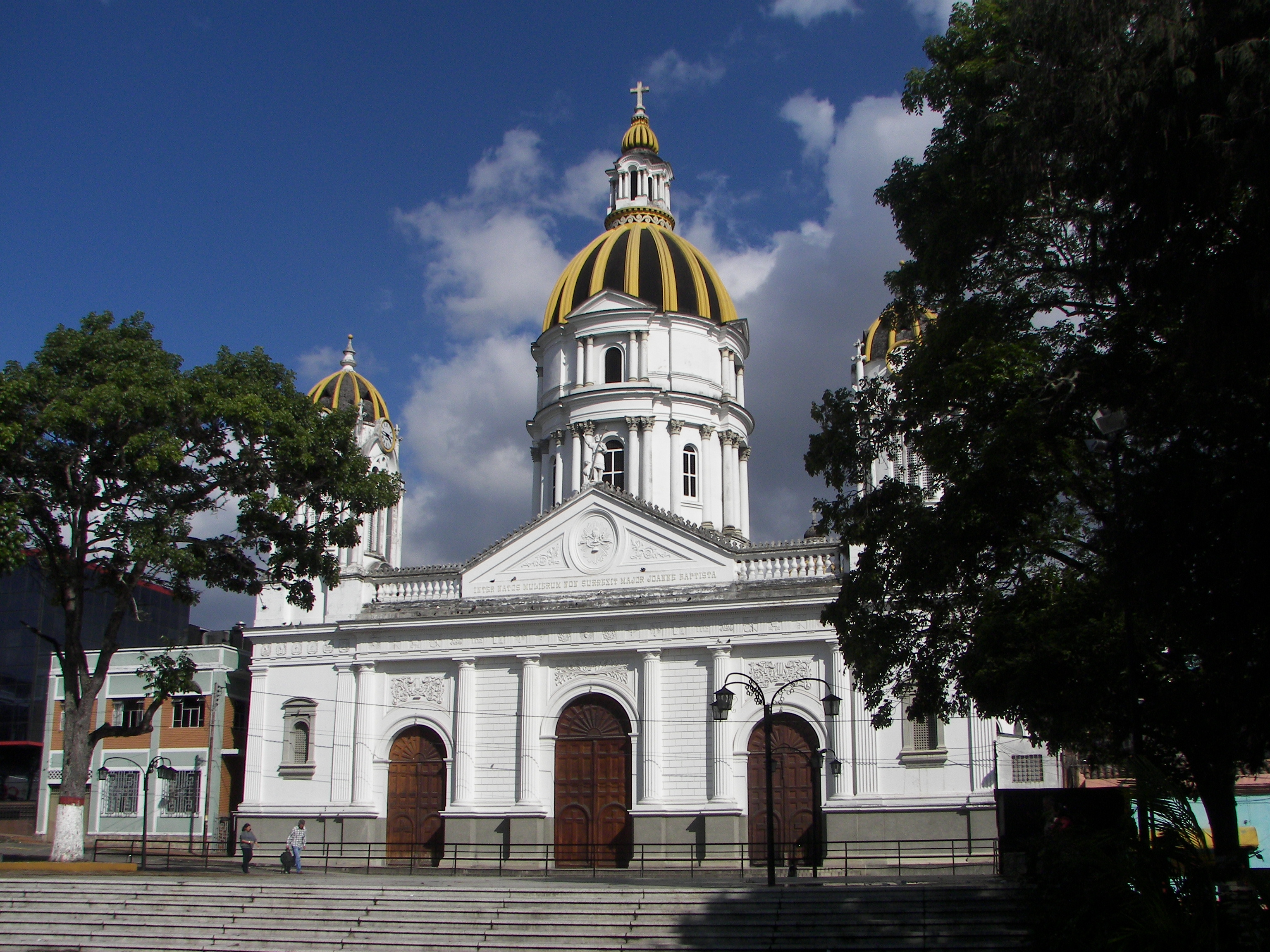 Iglesia de la Ermita (Iglesia de San Juan Bautista) San Cristóbal, Estado Táchira, Venezuela.